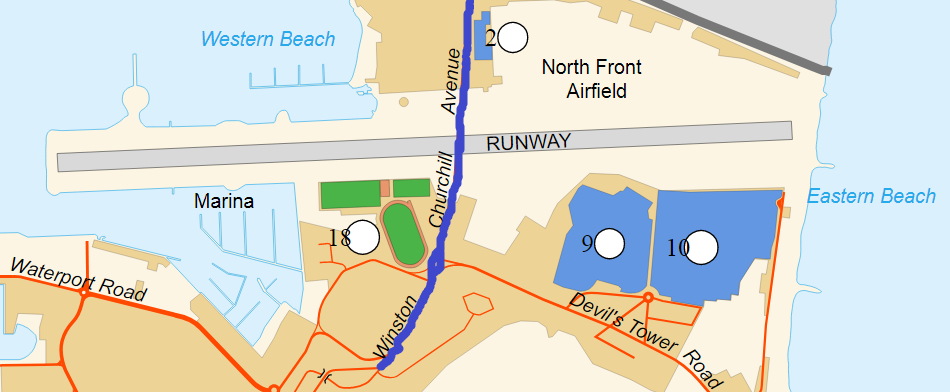 Vista de la Avenida Winston Churchill en azul.